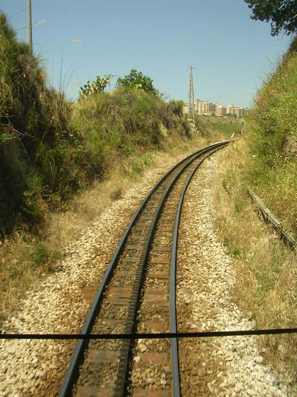 Cremagliera alla protezione di Sala